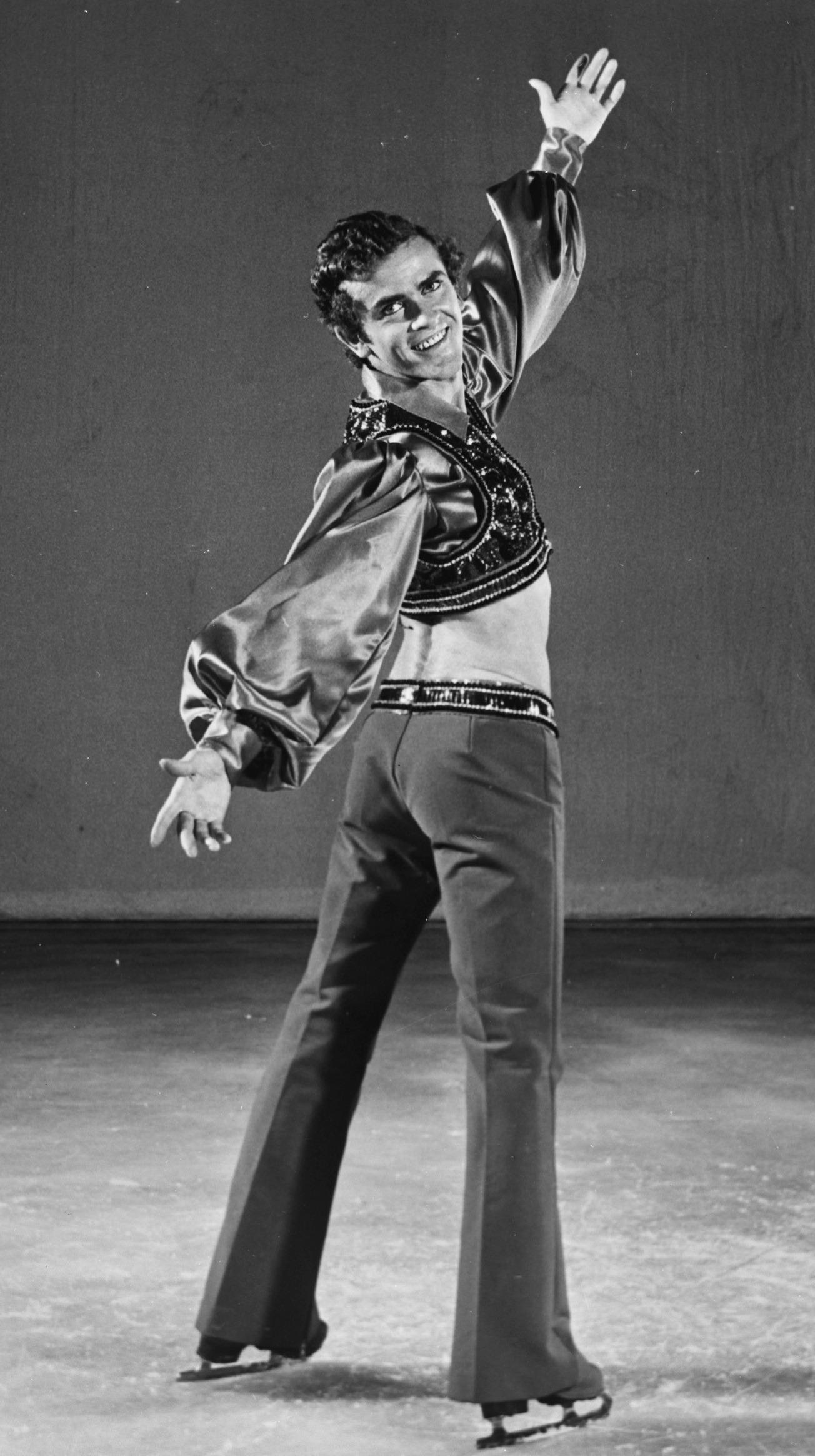 Holiday on Ice show , Amerikaanse wereldkampioen Donald McPherson